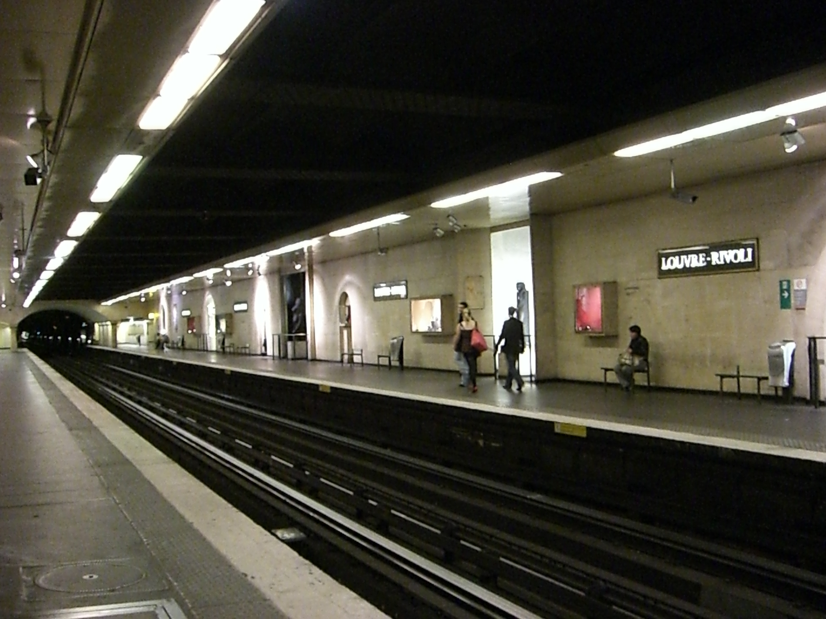 La station Louvre-Rivoli, Paris.